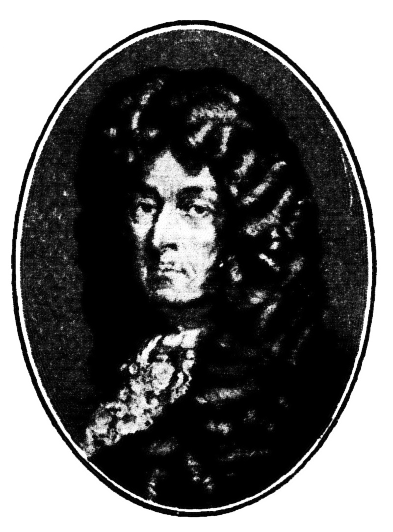 Hio Ludolf (1624-1704)